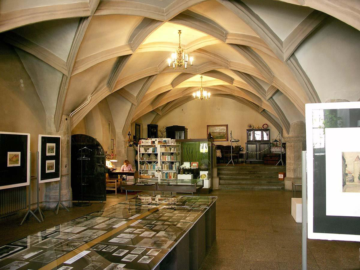 Główna sala muzealna.